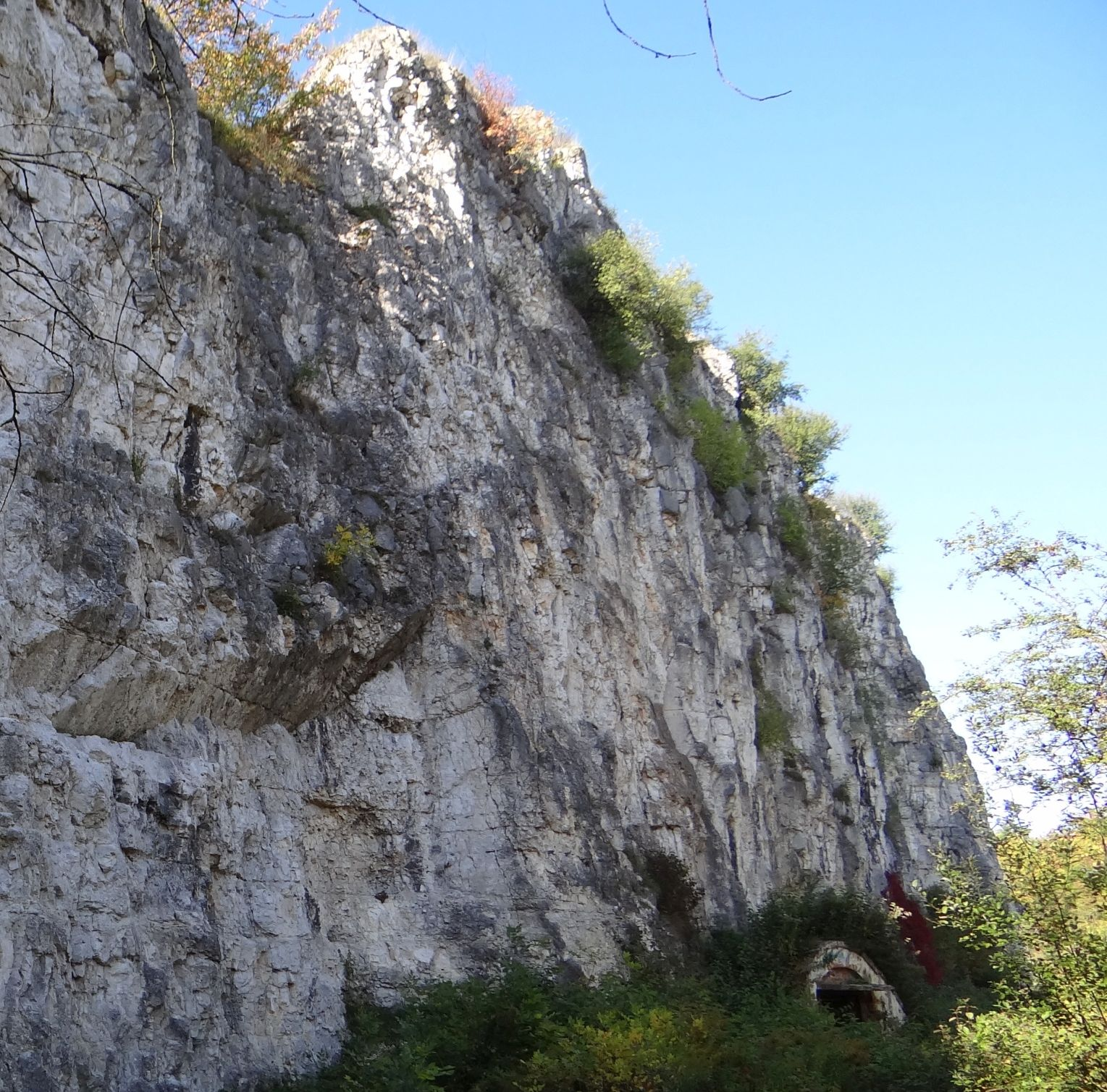 Mur Rdzawe Zacięcie na Zakrzówku w Krakowie